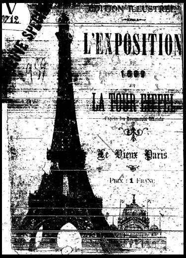 Couverture de L'Exposition de 1889 et la tour Eiffel, d'après les documents officiels. Livre de 1889 dans le domaine public.